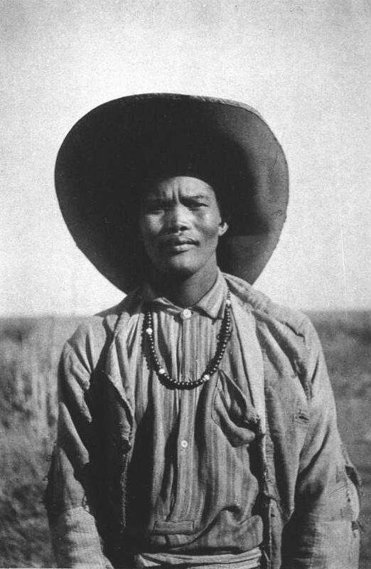 Deutsch-Südwest-Afrika 85. Kosis. Junger Bethanier-Hottentott.